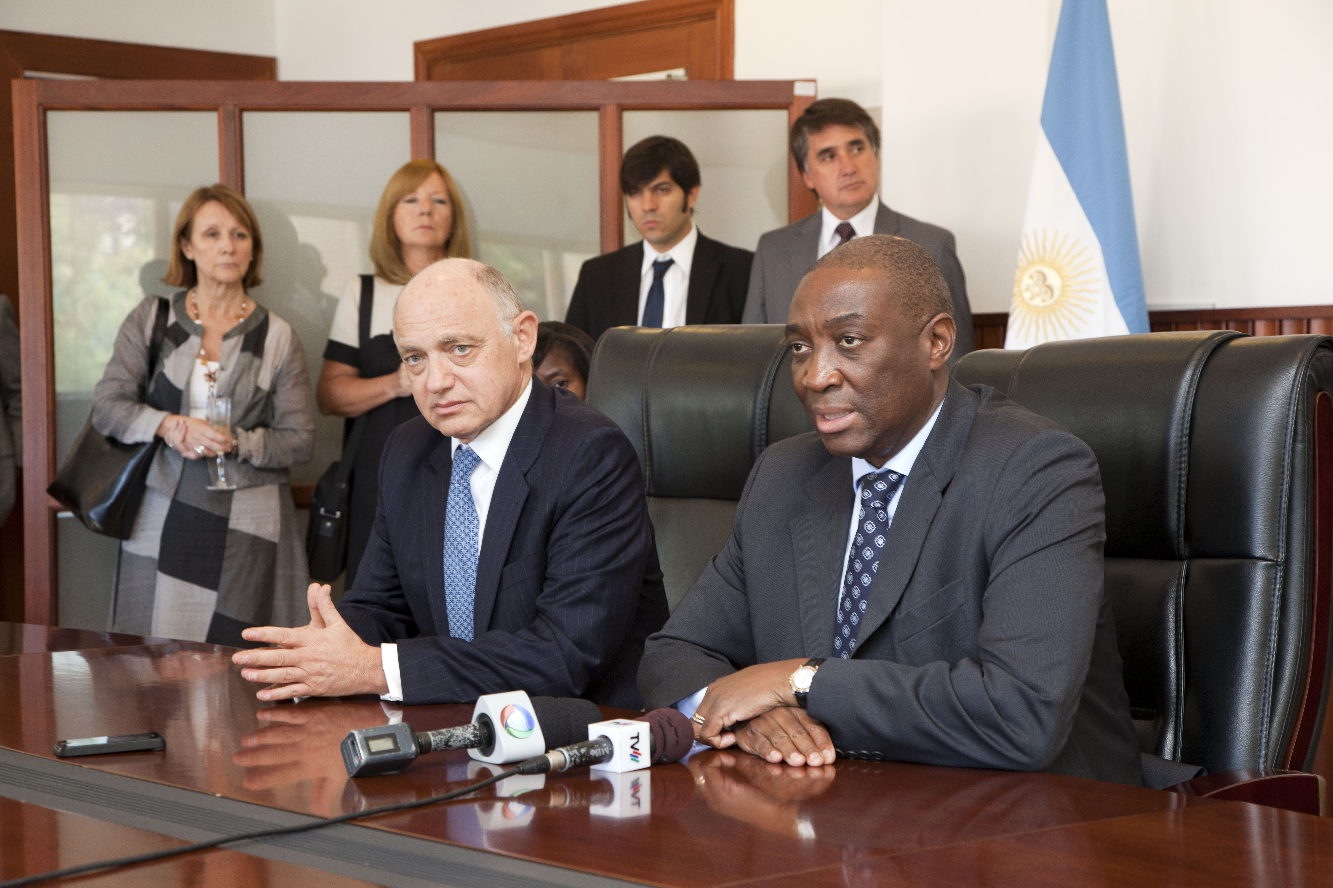 Mozambique, Maputo, Marzo 8 de 2012, El canciller argentino Héctor Timerman fue recibido por su par de ese país africano, Oldemiri Baloi, con quien mantuvo una reunión de trabajo y firmó convenios de interés bilateral